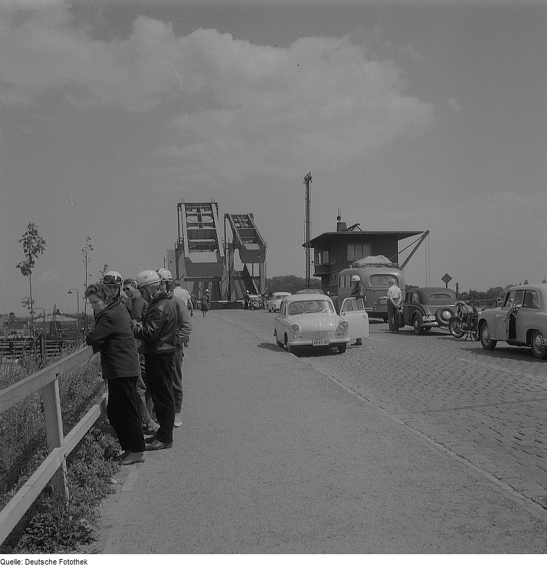 Original image description from the Deutsche Fotothek Stralsund. Rügendamm-Brücke mit Volkspolizei